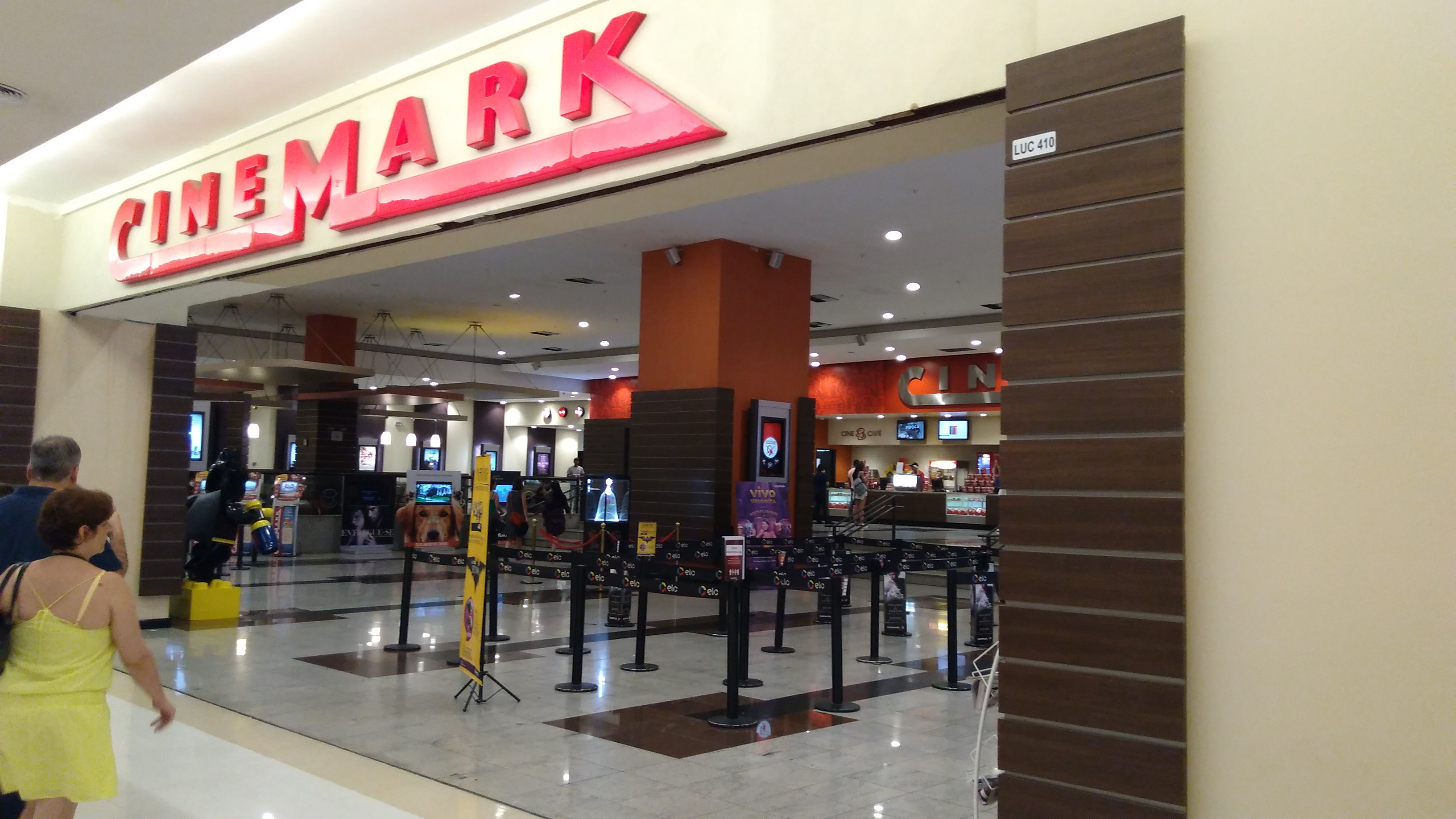 Vista da entrada do Cinemark Eldorado de São Paulo, SP